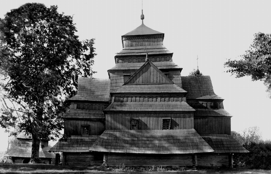 Церква Рiздва Пресвятої Богородицi у с. Мшанець, 1762 р. Вигляд з пiвночi. Розiбрана у 1912 р. Свiтлина В.Щербакiвського зi збiрки негативiв Iнституту народознавства НАНУ.